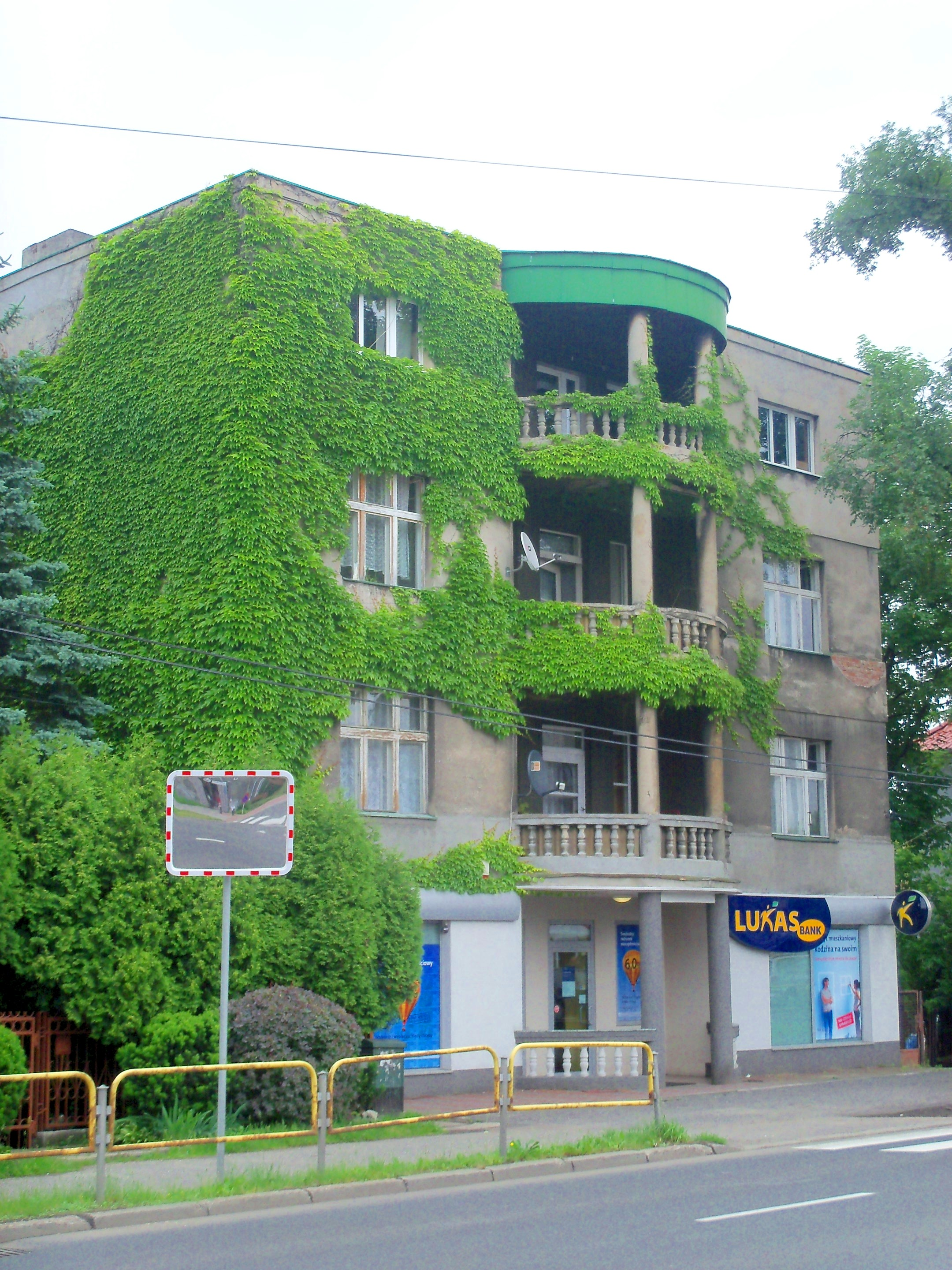 Budynek przy ul. Panewnickiej 62 w Katowicach. Przed 1939 rokiem mieścił się w nim sklep taniej sieci "Konsum"